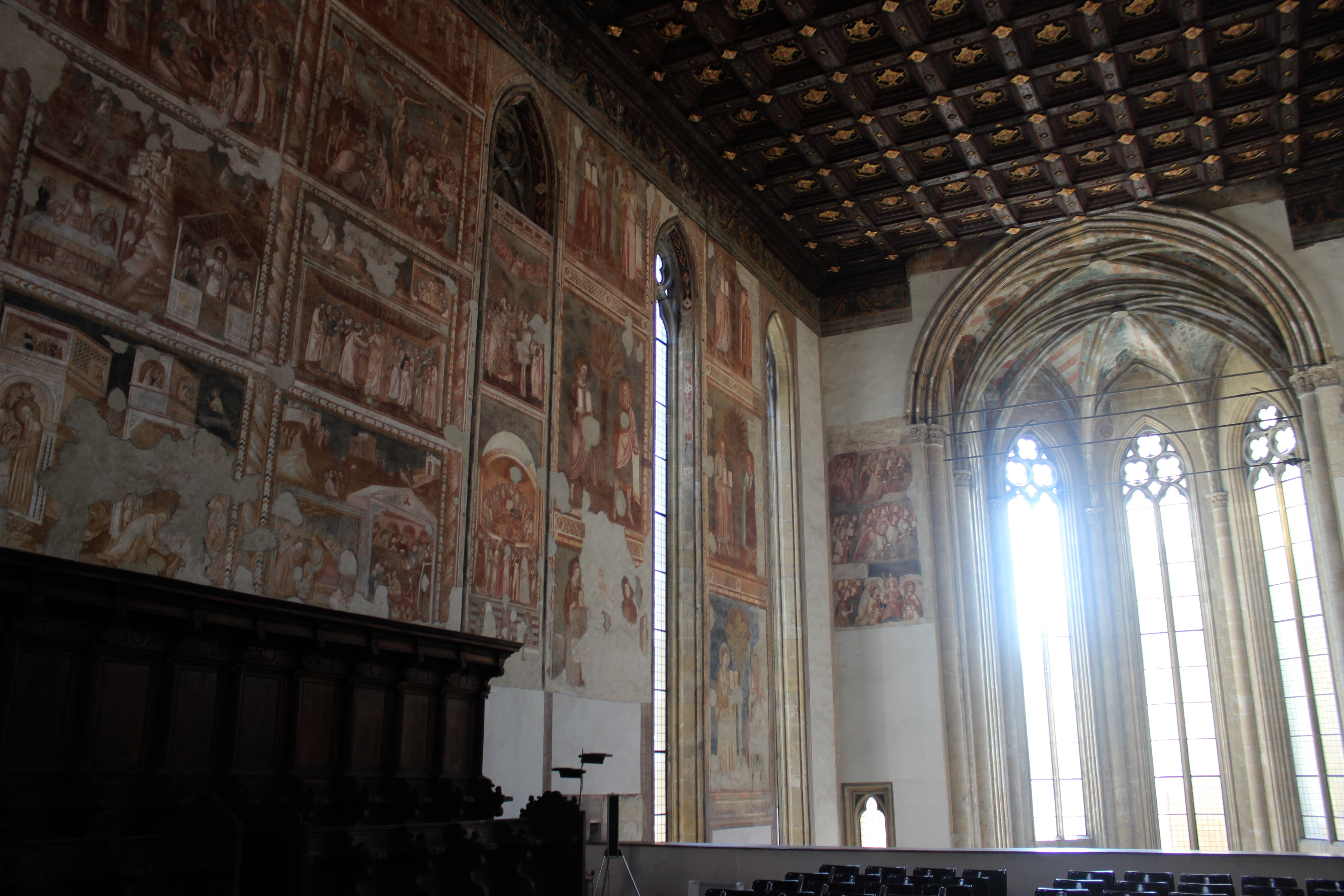 Nápoles. Iglesia de Santa Maria Donnaregina Vecchia.